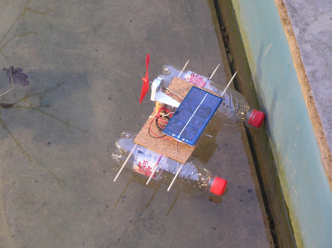 Das Foto zeigt ein Selbstgebautes Solar Boot auf der Wasseroberfläche